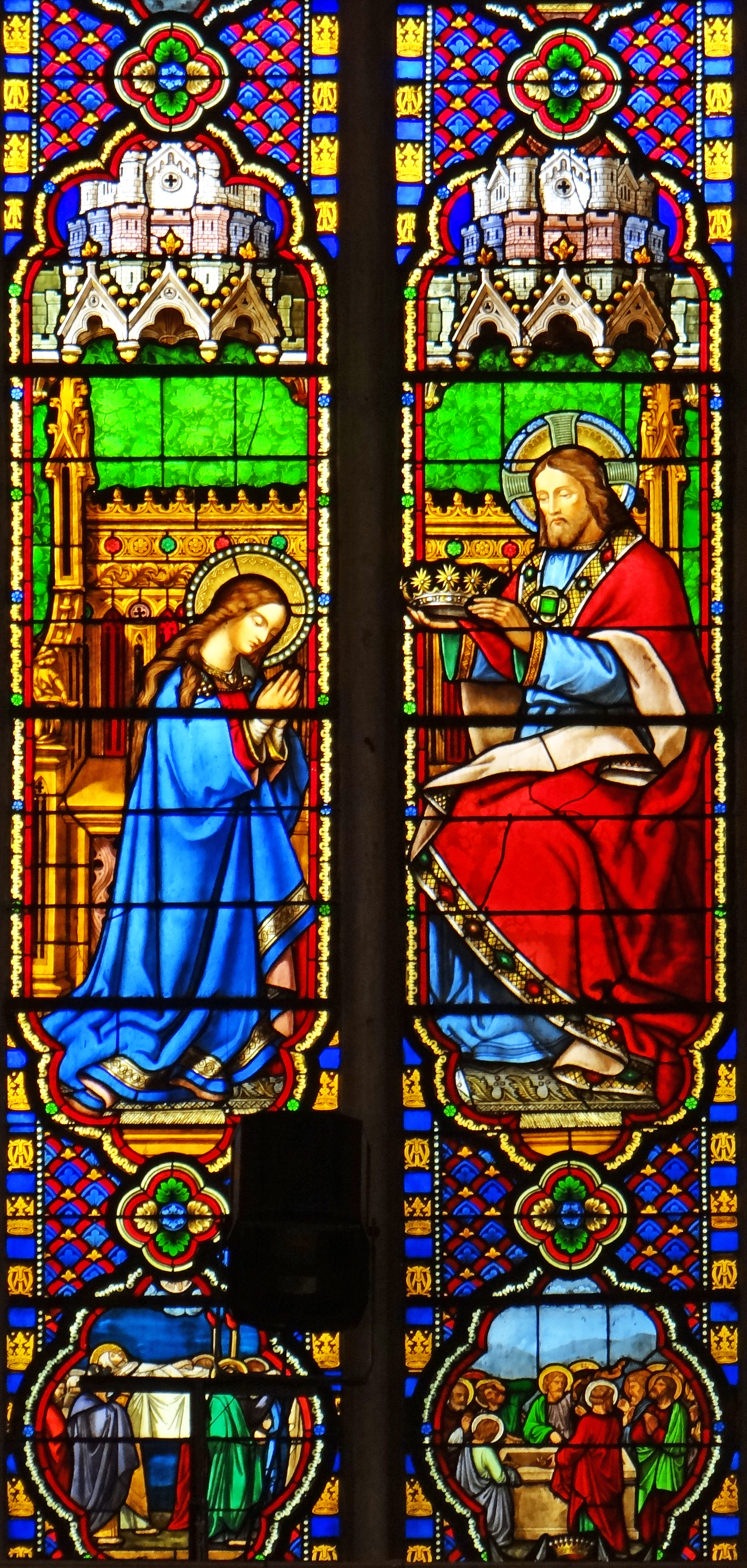 Marmande - Église Notre-Dame - Vitrail du Couronnement de la Vierge (maître-verrier : Émile Thibaud), dessous, mort de la Vierge et les apôtres autour de sa tombe